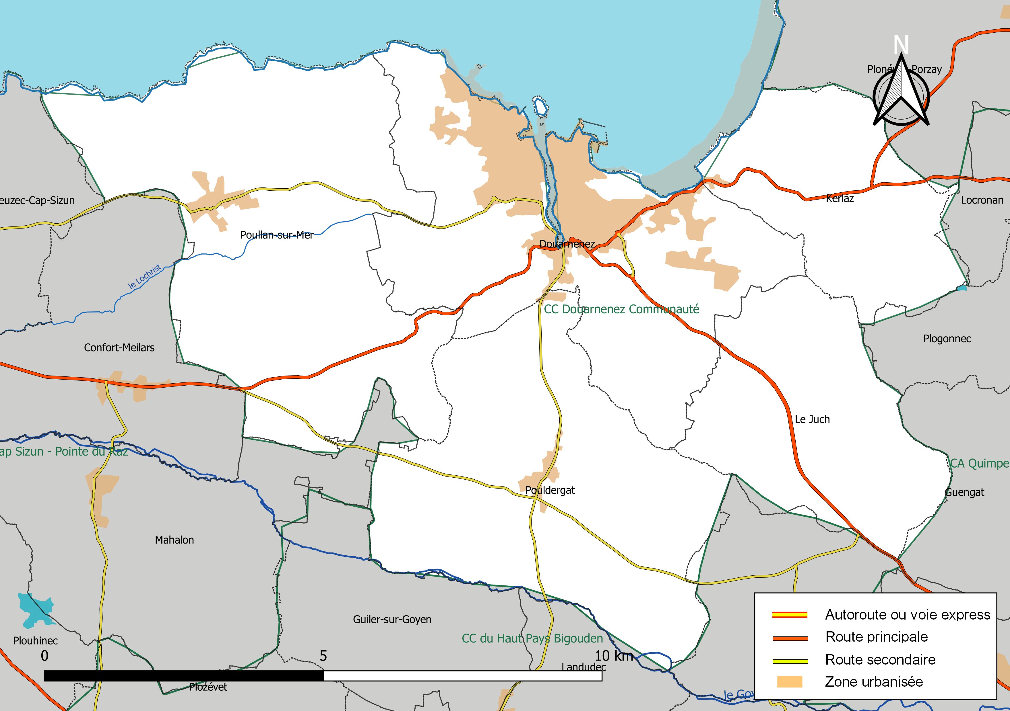 Carte géographique de l'intercommunalité Douarnenez Communauté, département du Finistère, France. Composition au 1er janvier 2019.